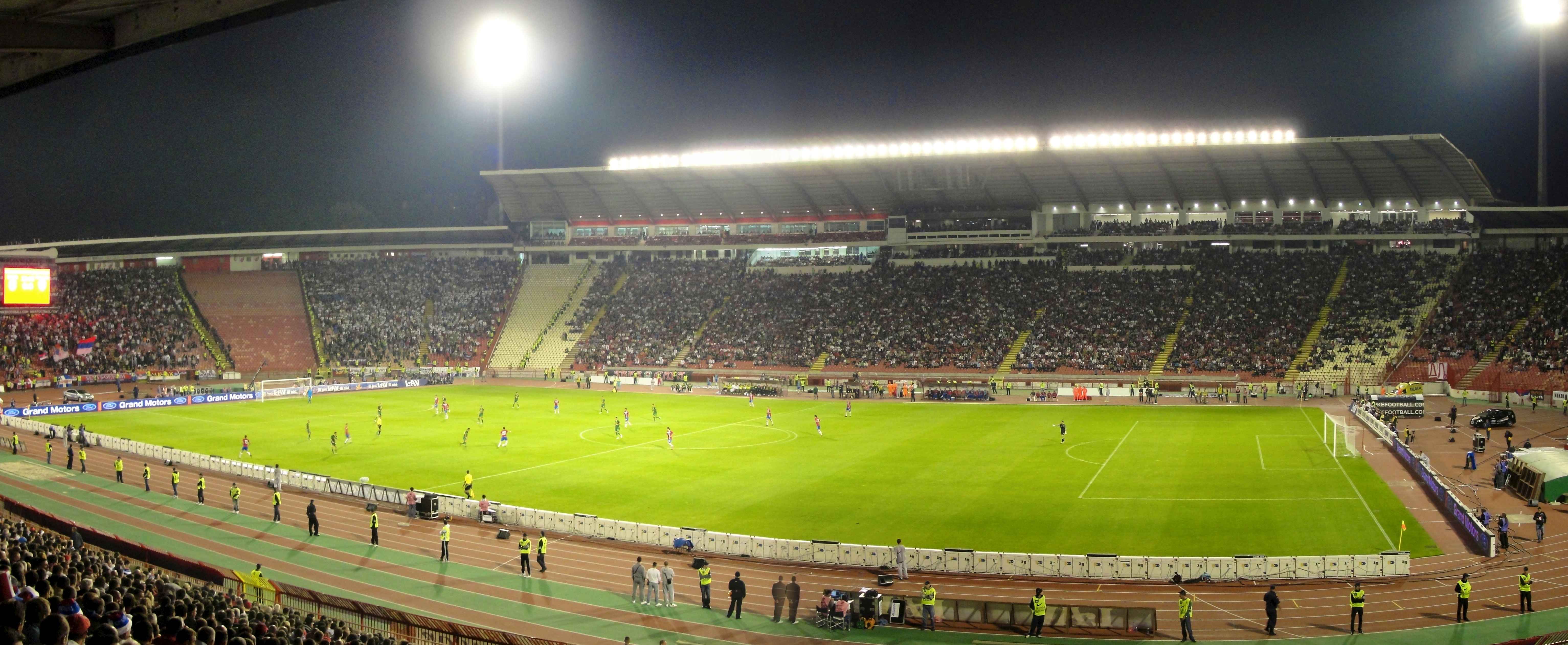 Serbia - Slovenija football match in Belgrade, 2010.jp